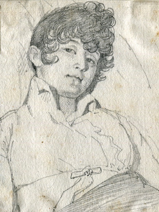 Frédéric-Christophe d’Houdetot (1778–1856): Die Schriftstellerin Rebecca Friedländer (1783–1850). Bleistift, laviert, beschriftet "Rebecca Berlin 1807". Bibliothèque du Conseil d’Etat, Paris, Album Houdetot, Nr. 138 (Ausschnitt).